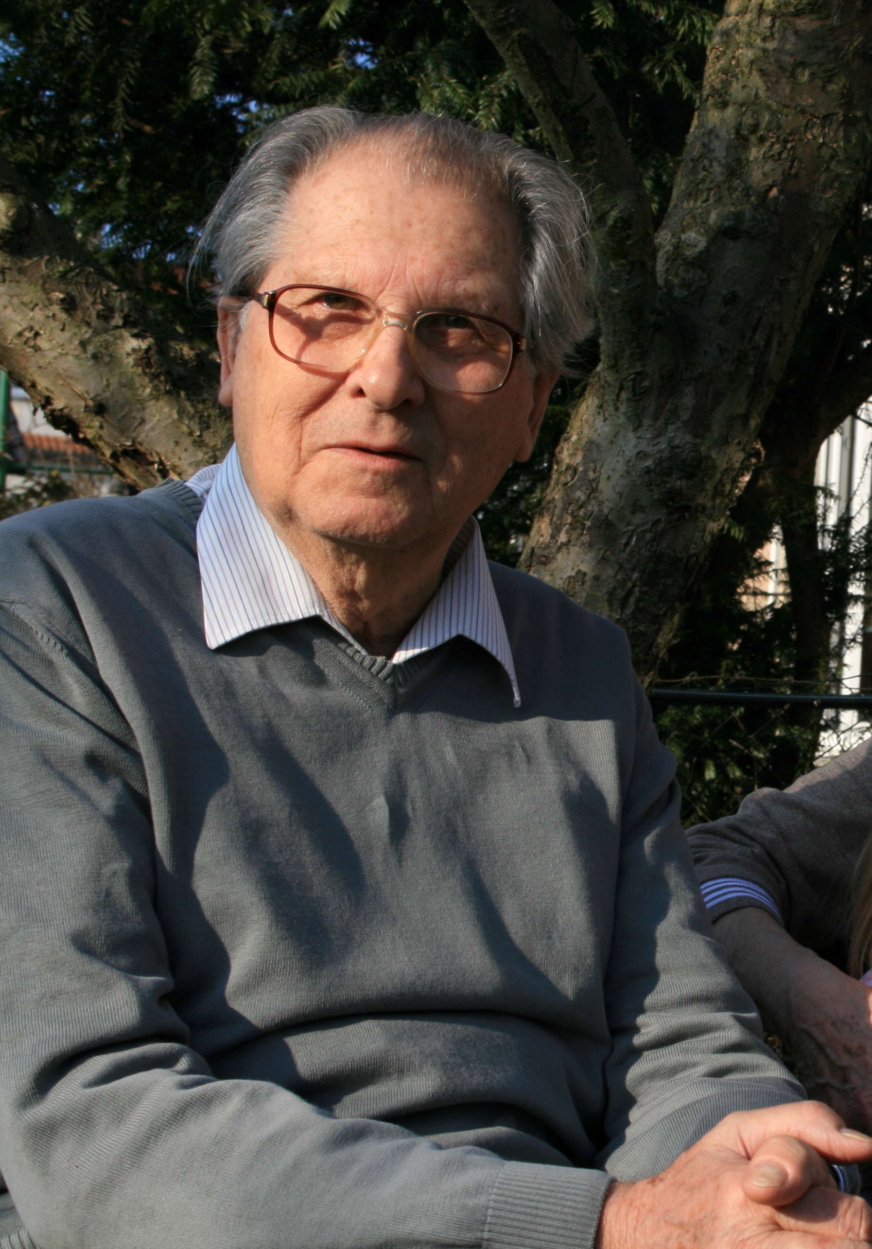 Wolfgang Porsche im März 2011 mit Frau Lilo und Enkeltochter Clara